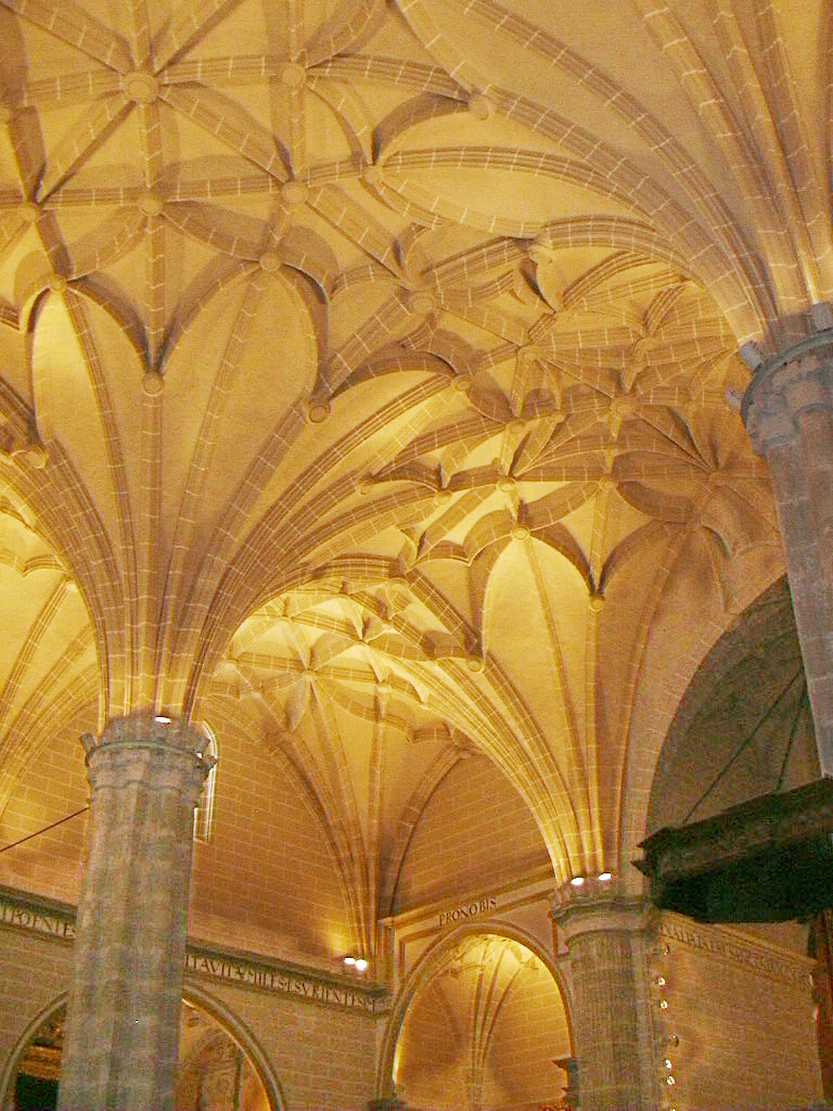 Tracería del techo. Colegiata de Bolea (Huesca, España)